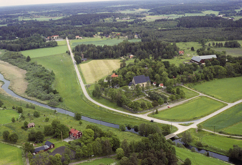 Roslags-Bro kyrka i bildens mitt. Fotot från sydväst. Motiv: Roslags-Bro Nyckelord: Flygbilder, Riksintressen Kategori: KyrkomiljöRoslags-Bro kyrka i bildens mitt. Fotot från sydväst.